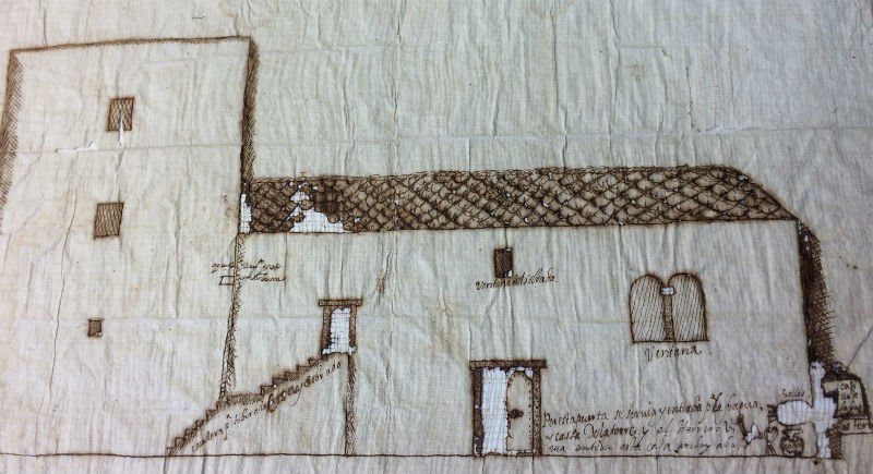 Imaxe do plano da torre de Quitapesares